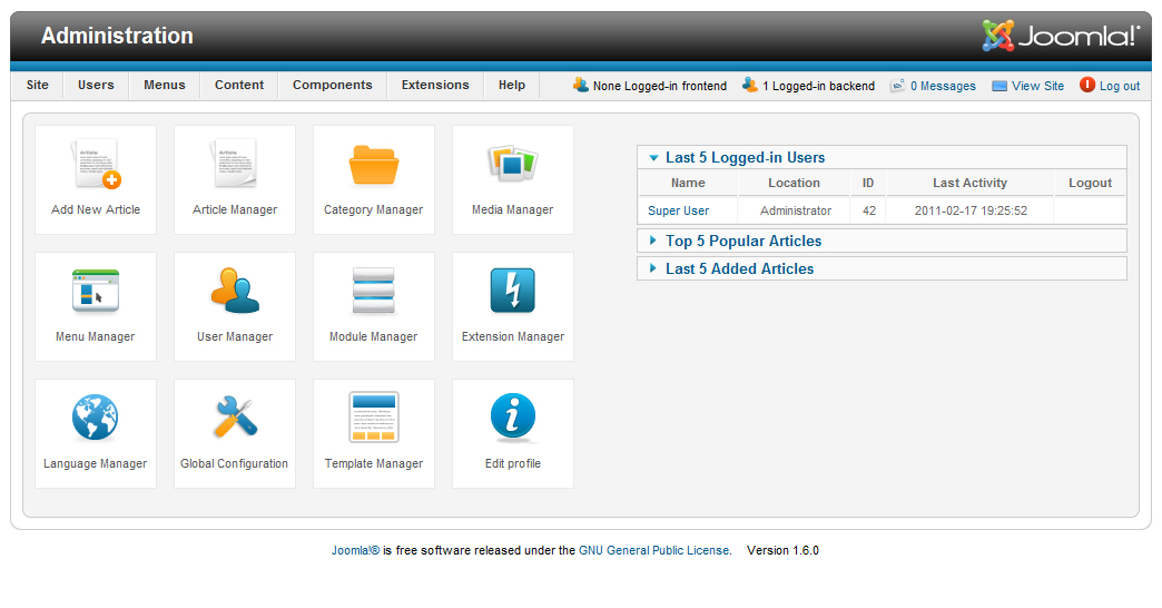 Административная панель Joomla версии 1.6